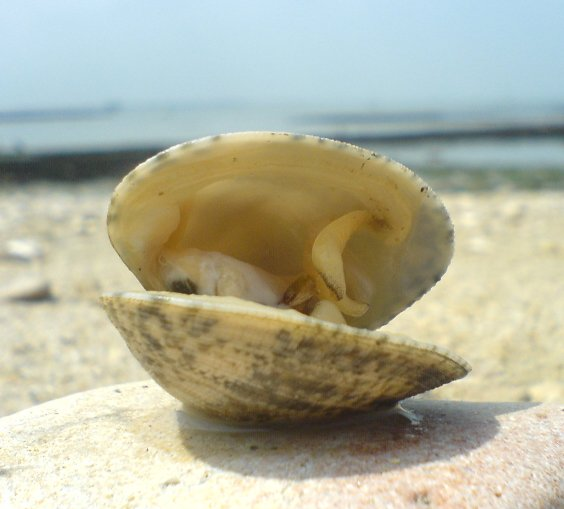 Palourde fraîchement pêchée, ouverte au couteau et prête à déguster.